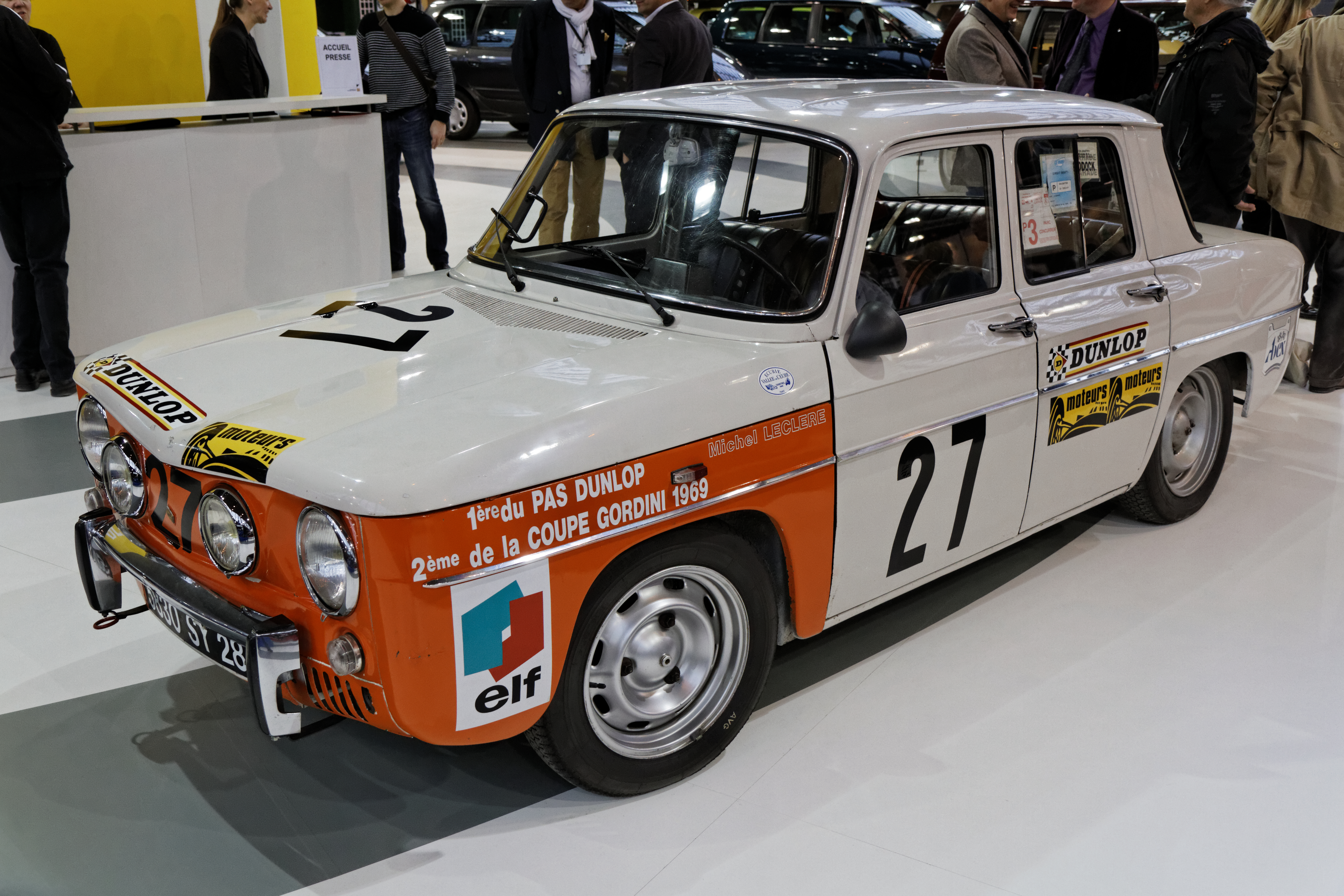 Une Renault 8 Gordini ex Michel Leclère présentée lors du salon Retromobile 2014.